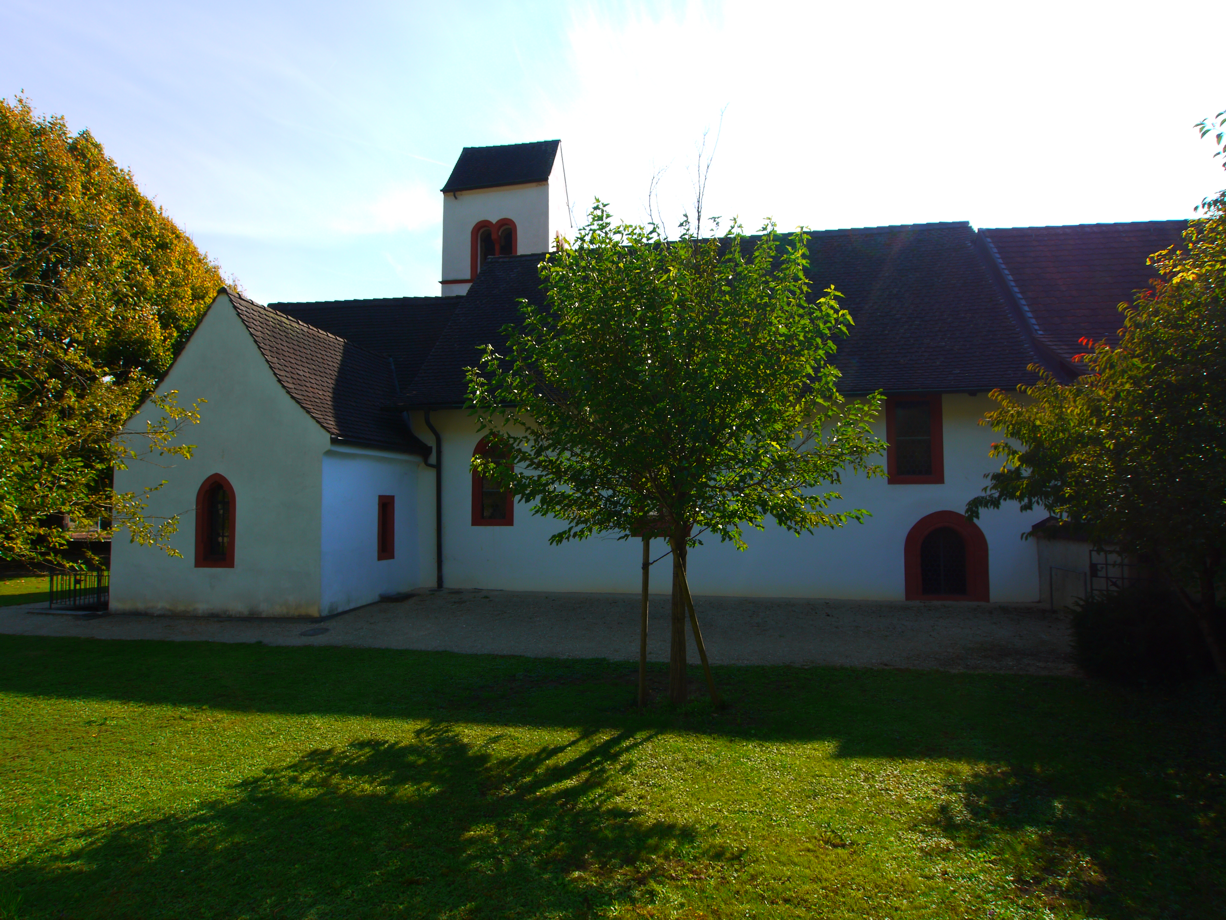 Bettenach (römische bis hochmittelalterliche Siedlung) bei Lausen, später wurde an diesem Ort eine Kirche errichtet (Bild). Von der eigentlichen Siedlung ist nichts mehr zu sehen.